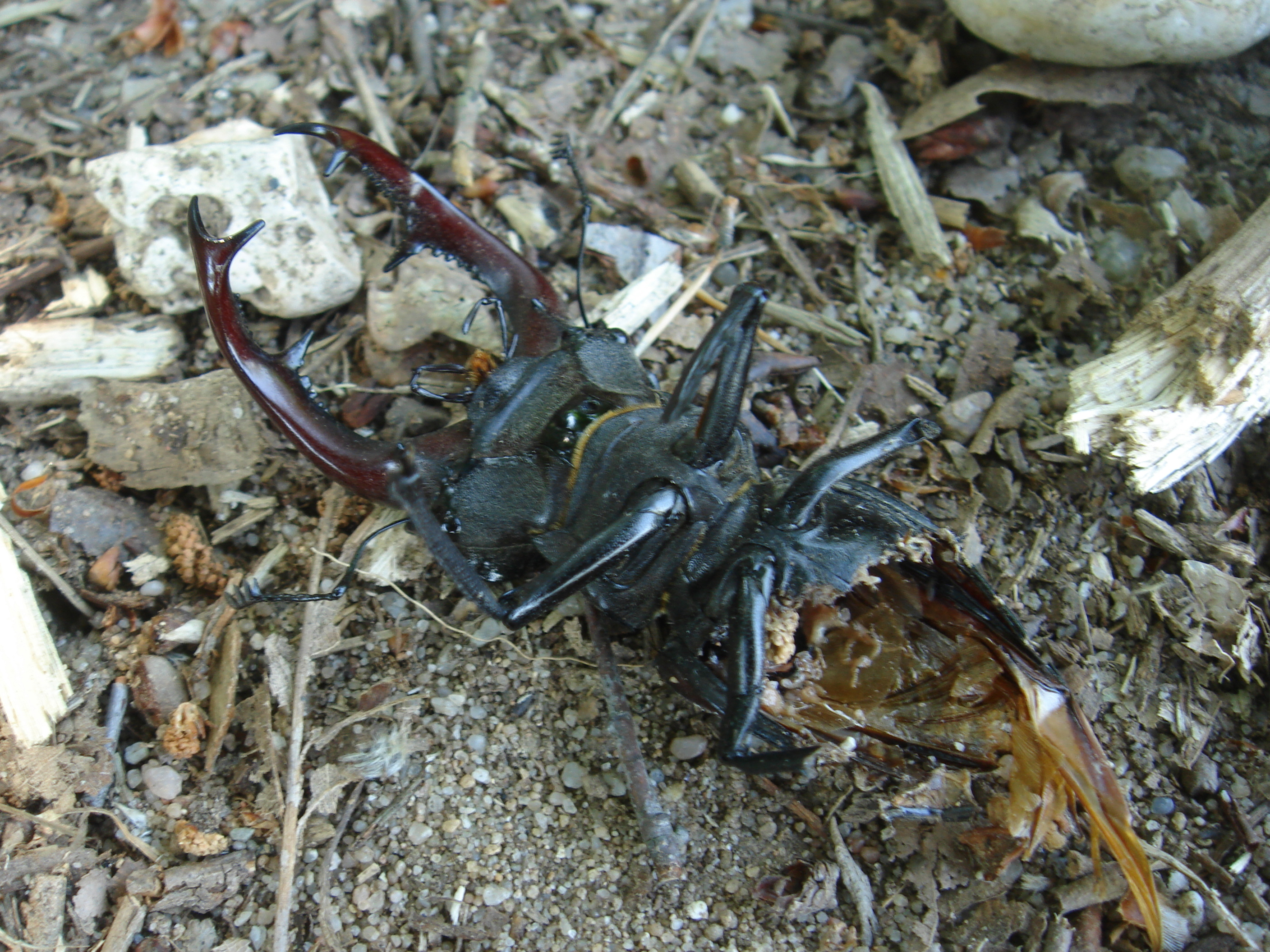 Lucanus cervus, Angefressener Hirschkäfer (Kelsterbach, Germany)